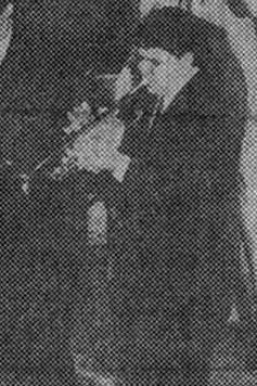 Foto del "Sexteto Mañosa" (Hot Club de Montevideo) tocando "Milestones" en el Teatro Florida, publicada en el diario "La Prensa" en Octubre de 1963. Buenos Aires , Argentina. Sexteto: Paco Mañosa, Bocho Pintos, Hector Bingert, Daniel "Bachicha " Lencina, Roberto "Pelin" Capobianco, Osvaldo Fattoruso.